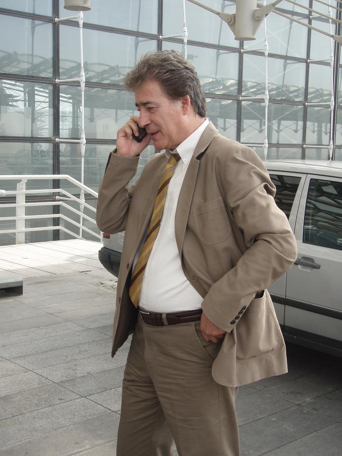 Nasser Hejazi, Trainer der iranischen Nationalmannschaft, am Imam International Airport, eine Stunde vor dem Abflug nach Europa